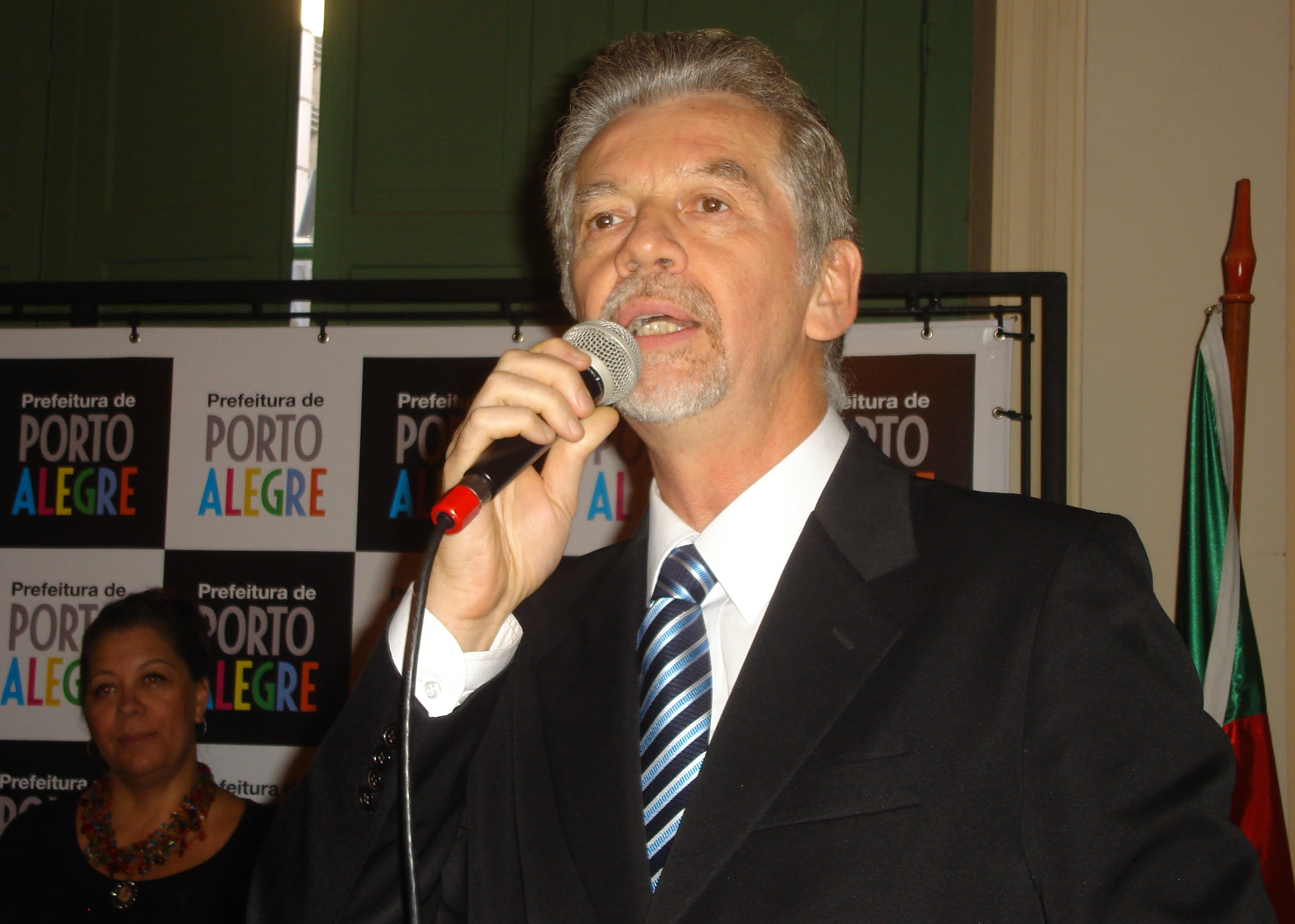 Prefeito de Porto Alegre José Fortunati na cerimônia de posse do Secretário de Coordenação Política e Governança Local de Porto Alegre Cézar Busatto.